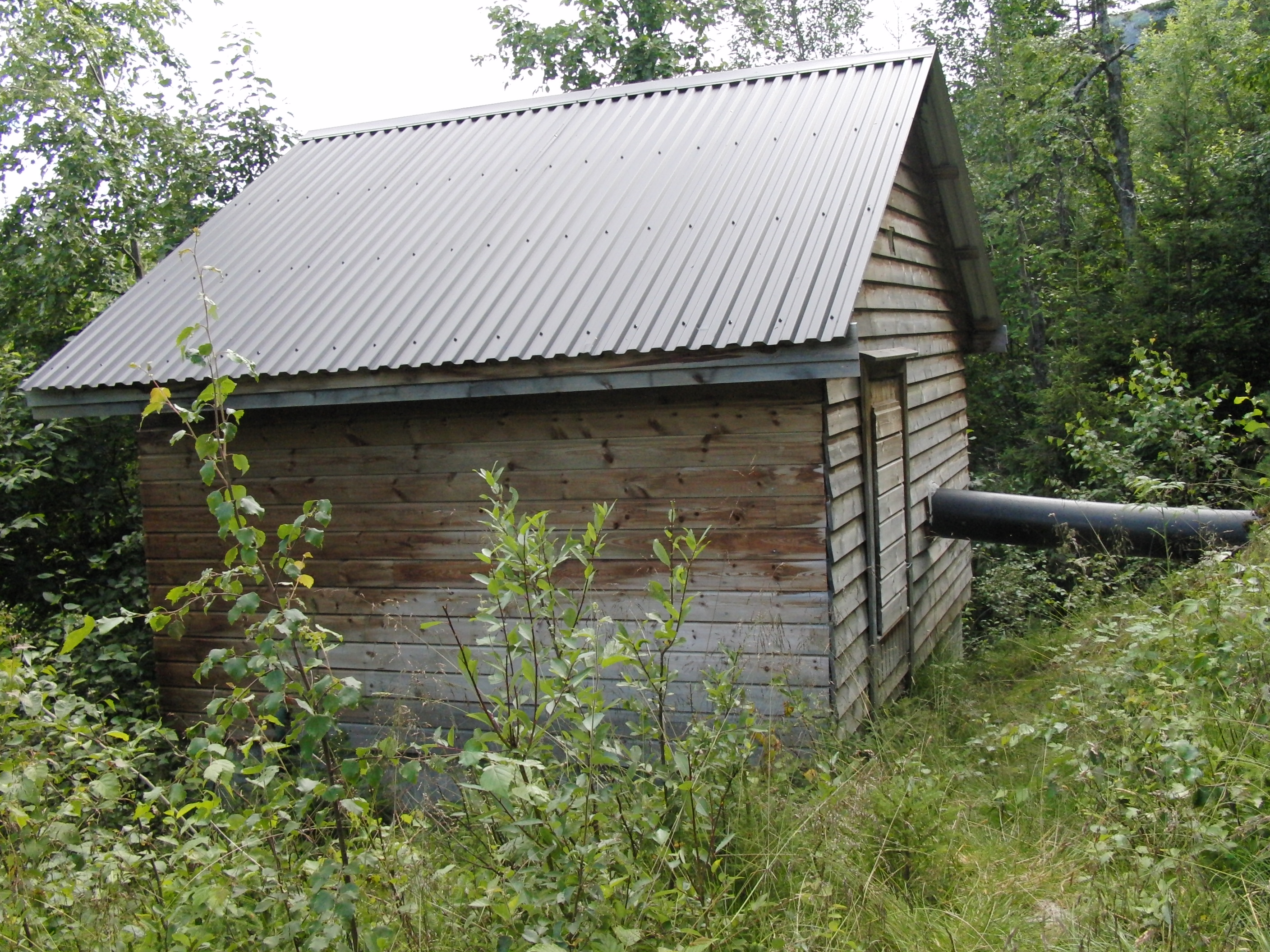 Harastølen II minikraftverk